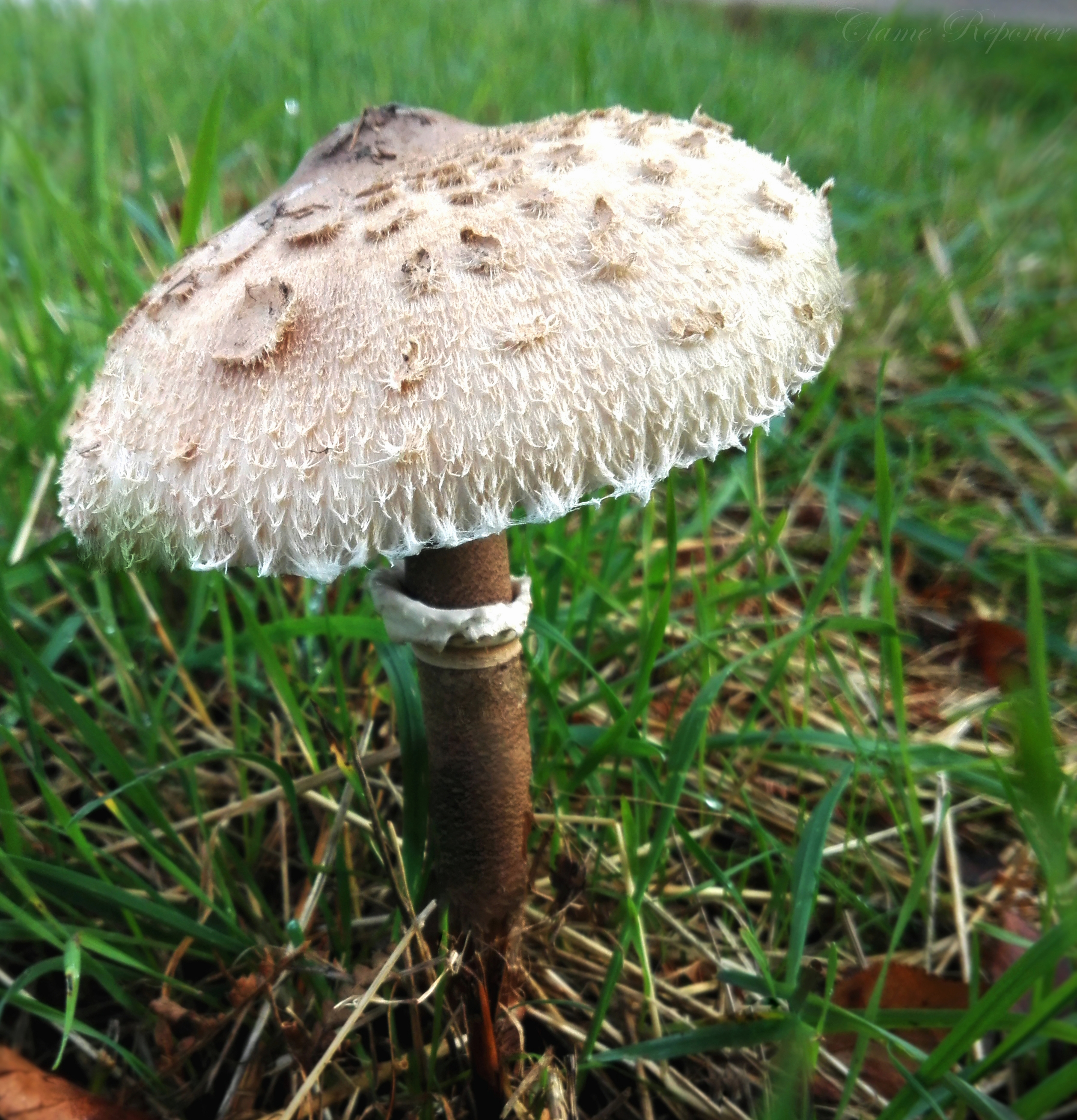 La Cocherelle est une espèce de champignon comestible qui pousse généralement de Septembre à Octobre en lisière de forêt, au bord des chemins ou bien dans les champs entretenus voir dans les clairières. Elle est également connue pour ses propriétés anti-tumorale, antioxydante et antibiotique. C'est une espèce qui est recherchée pour son goût. Très répandue dans le Bourbonnais, elle aura donné son nom aux habitants de Saint-Plaisir nommés : Cocheriaux.